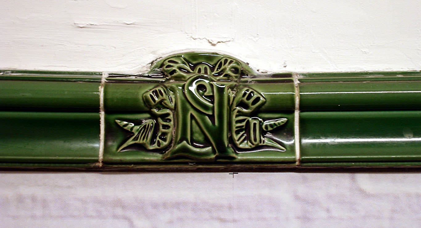 Station Sèvres - Babylone de la ligne 12 du métro de Paris, France.